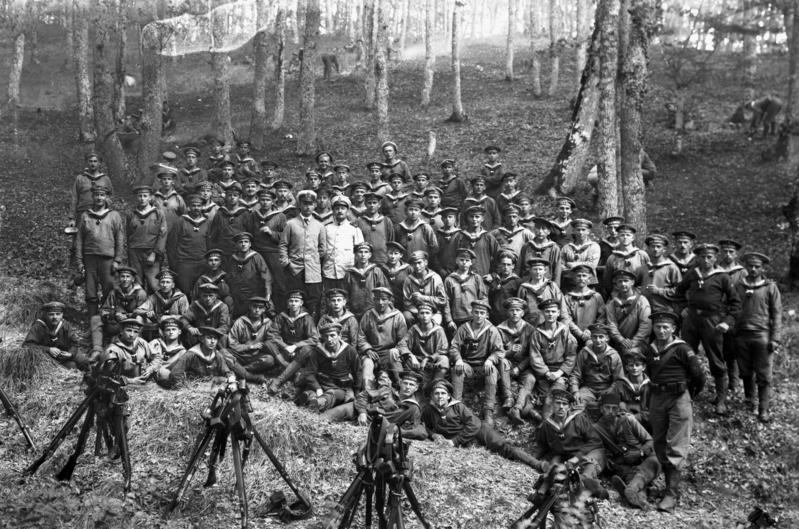 Kreuzer Breslau, Landungskorps Breslau, Stapell.: 16.5.1911 Kleiner Kreuzer Landungskorps des Schiffes [Kreuzer Breslau unter türkischer Flagge "Midillih"]